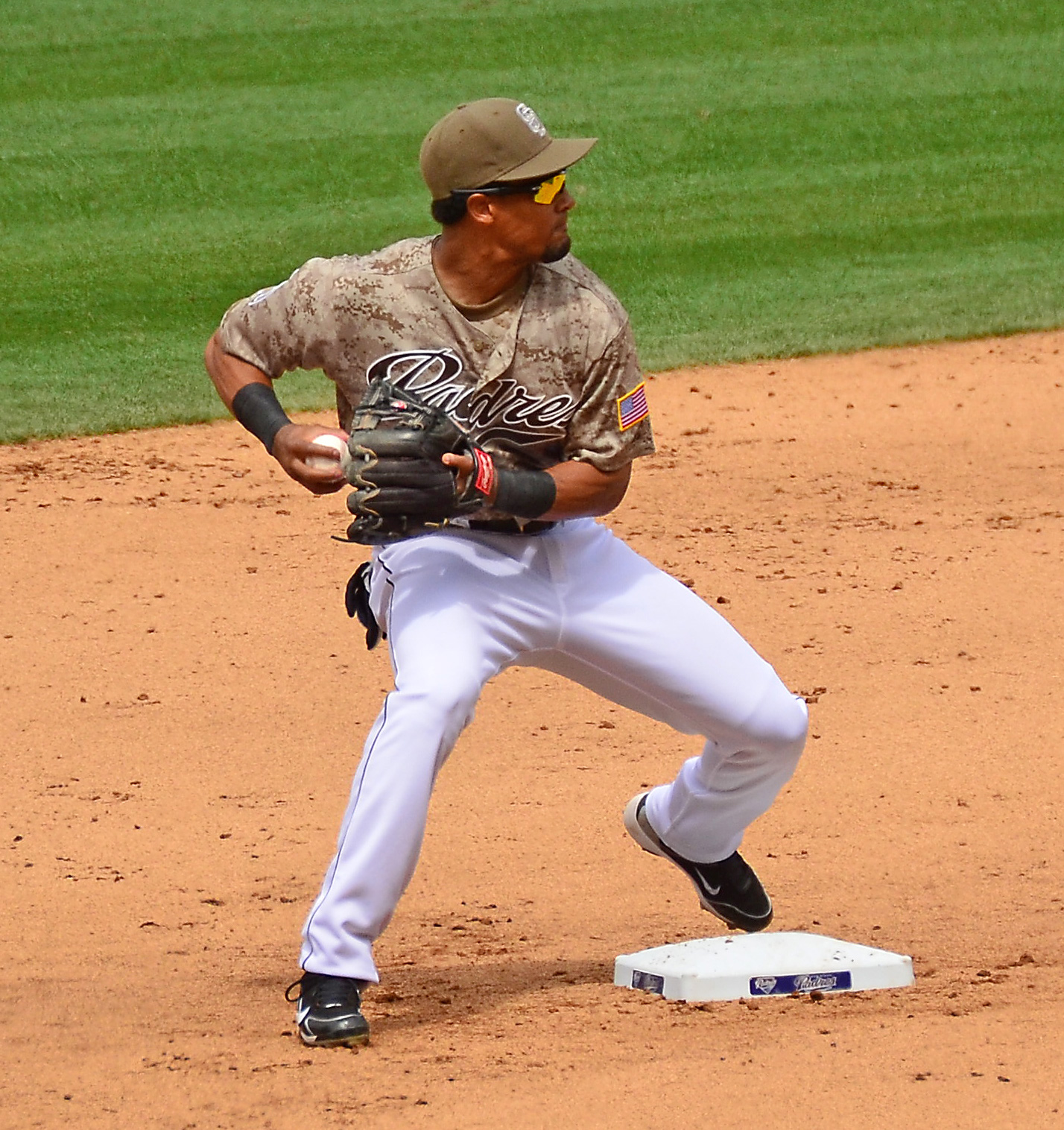 Eric Patterson